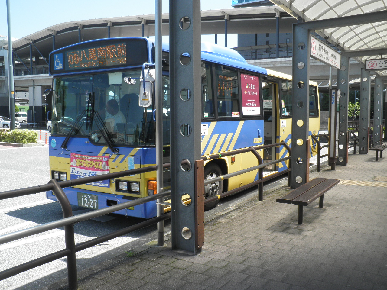 久宝寺線09系統八尾南駅前行き（久宝寺駅前にて）